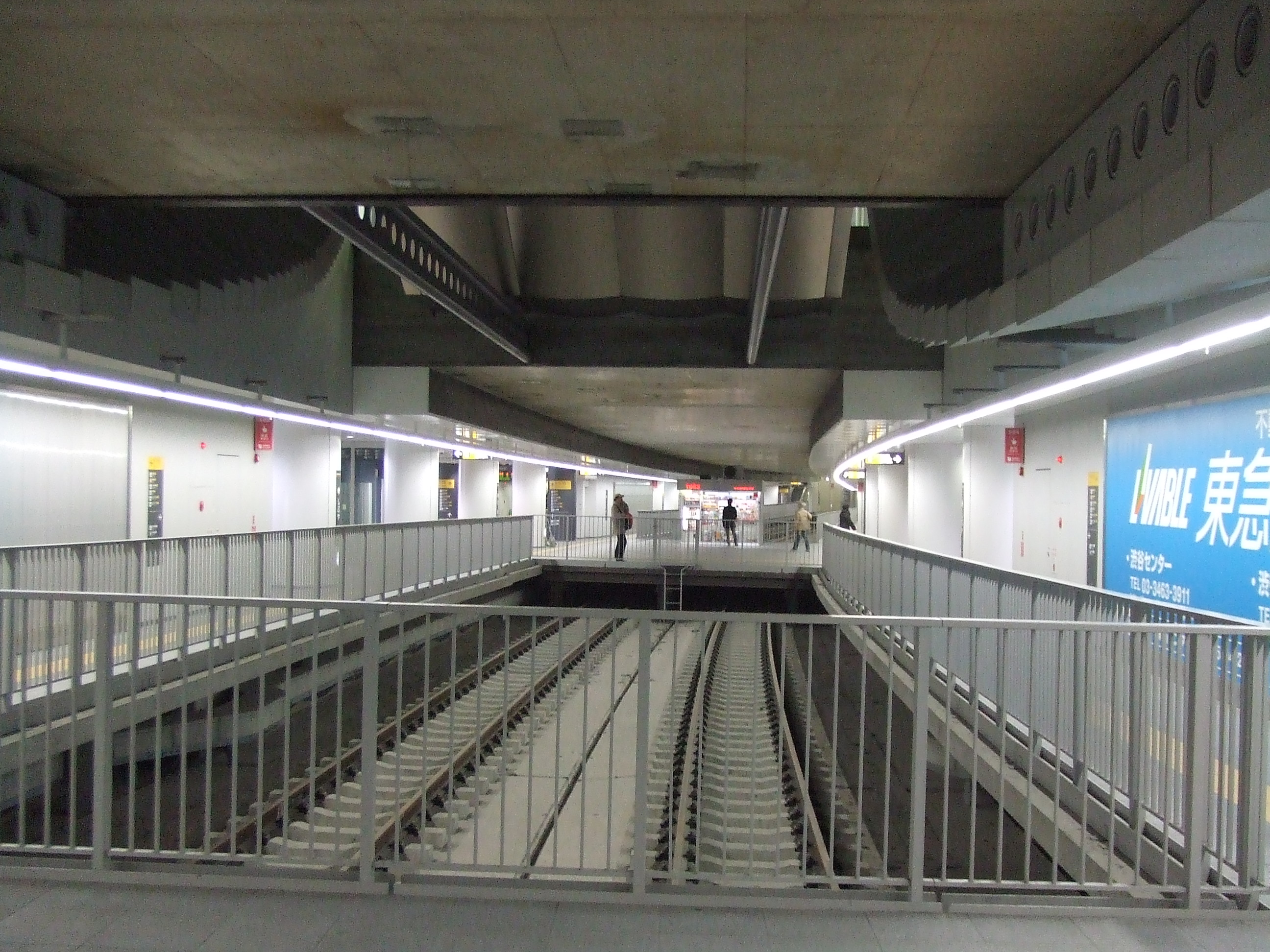 東京メトロ副都心線 渋谷駅 東横線との直通運転開始前